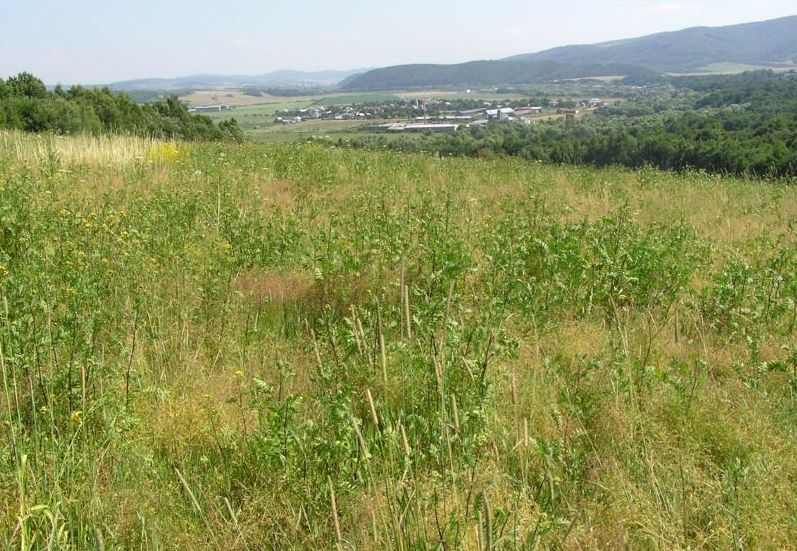 Celkový pohľad